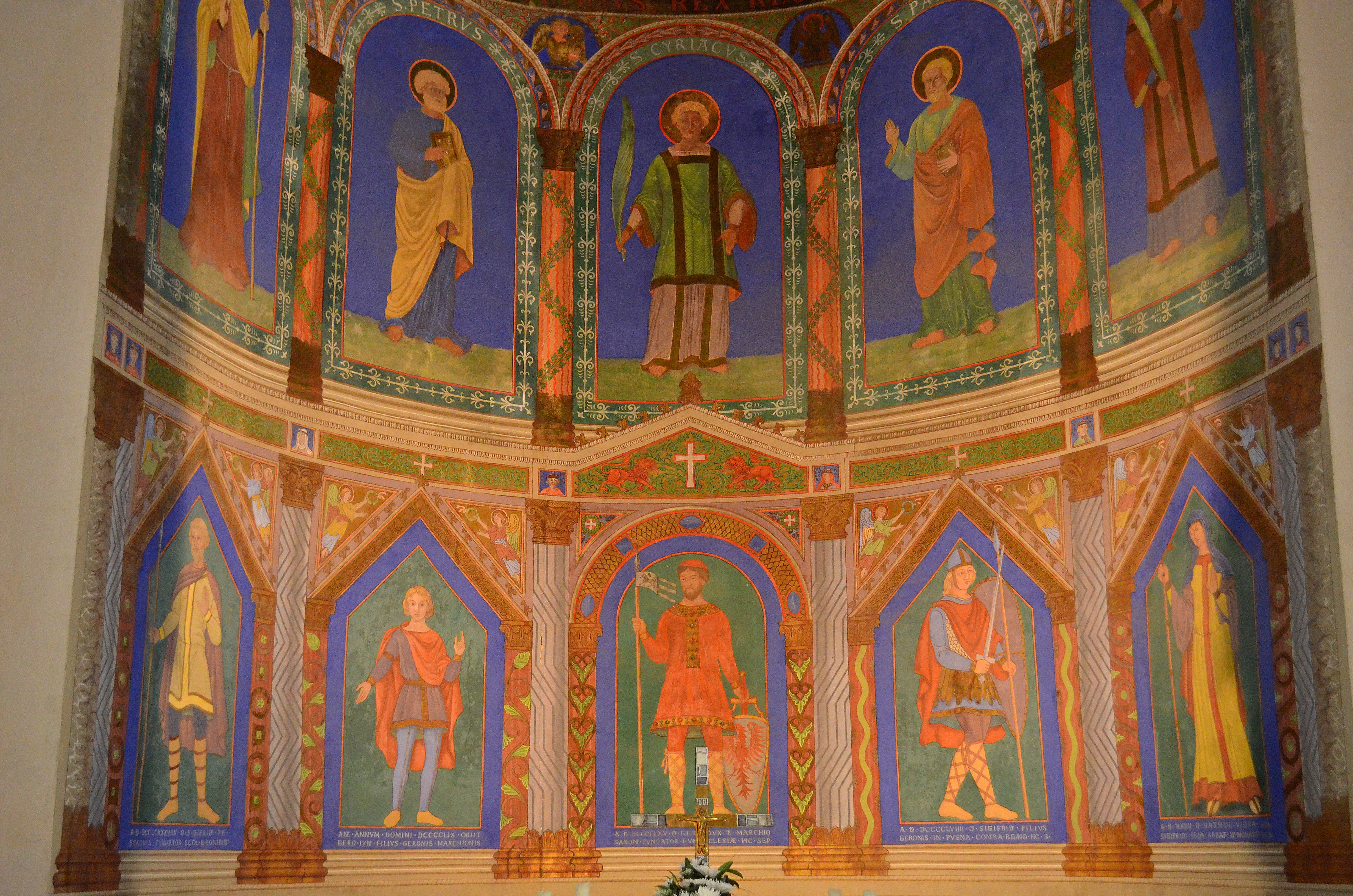 Stiftskerk Sint-Cyriacus apsis